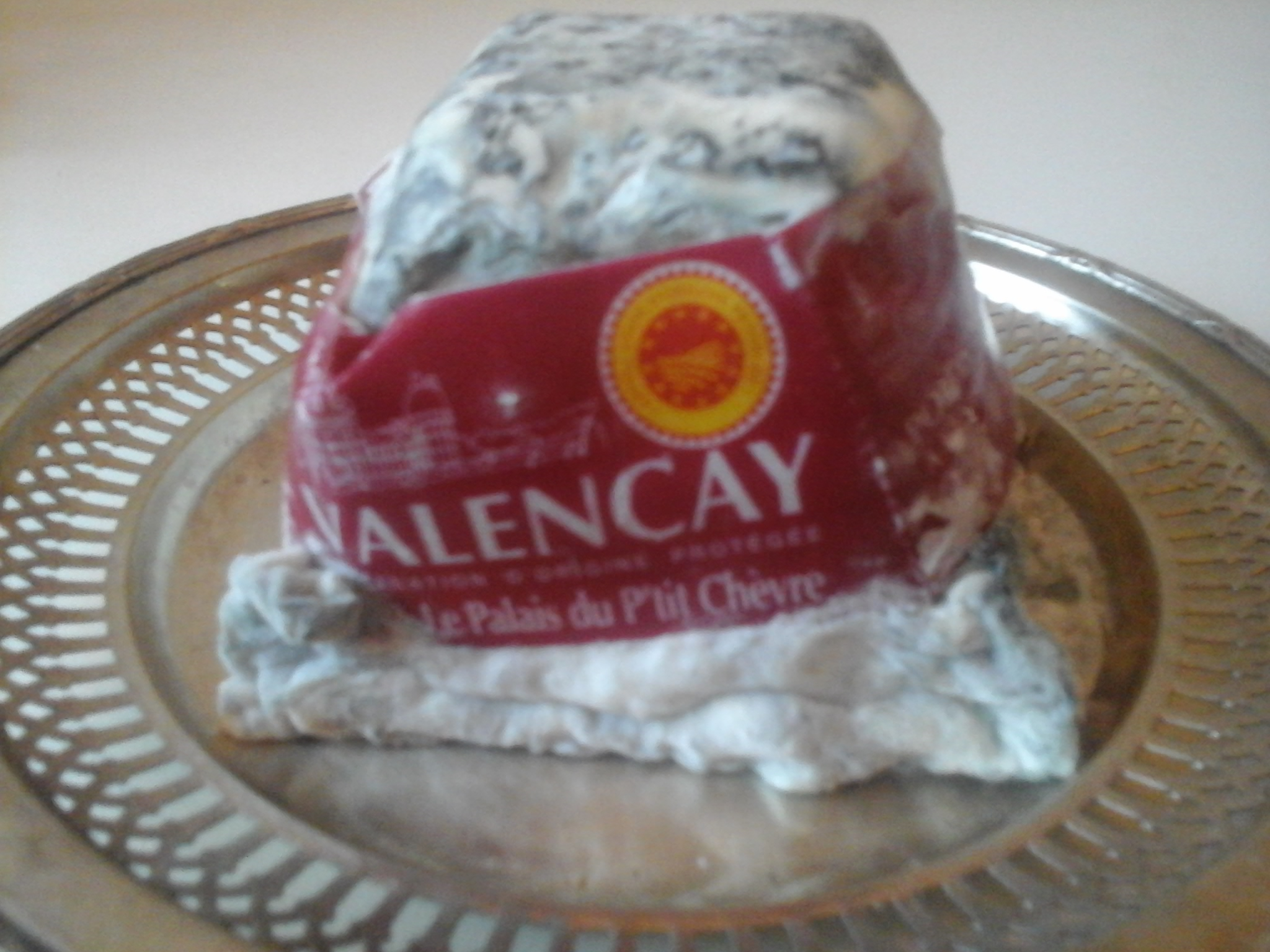 Fromage de Valençay.